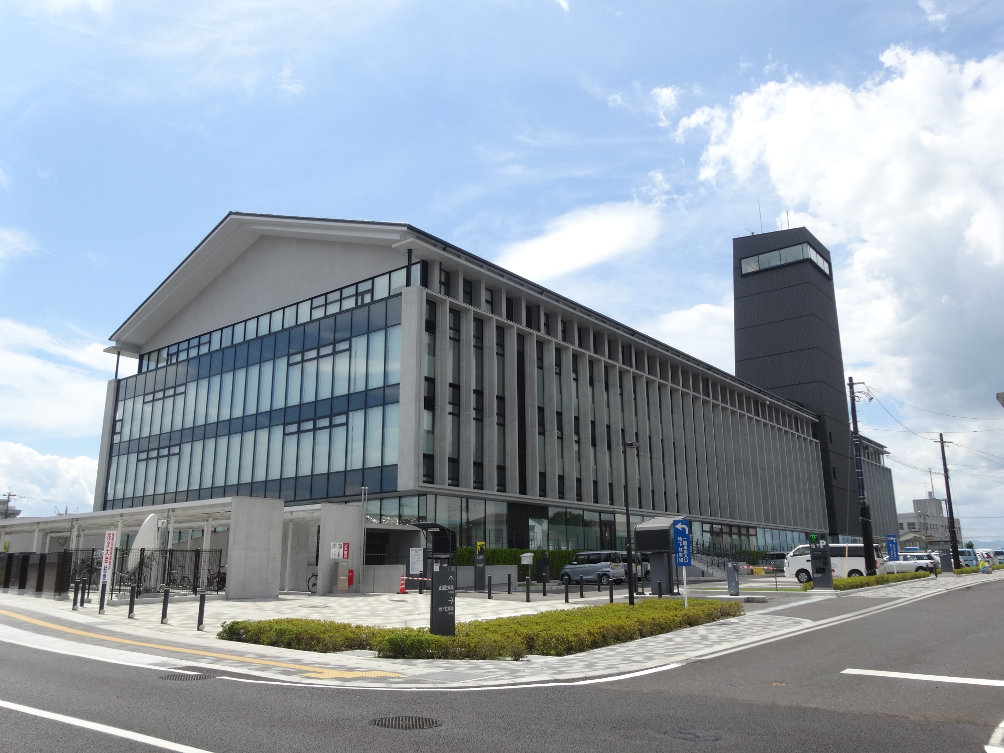 須賀川市役所